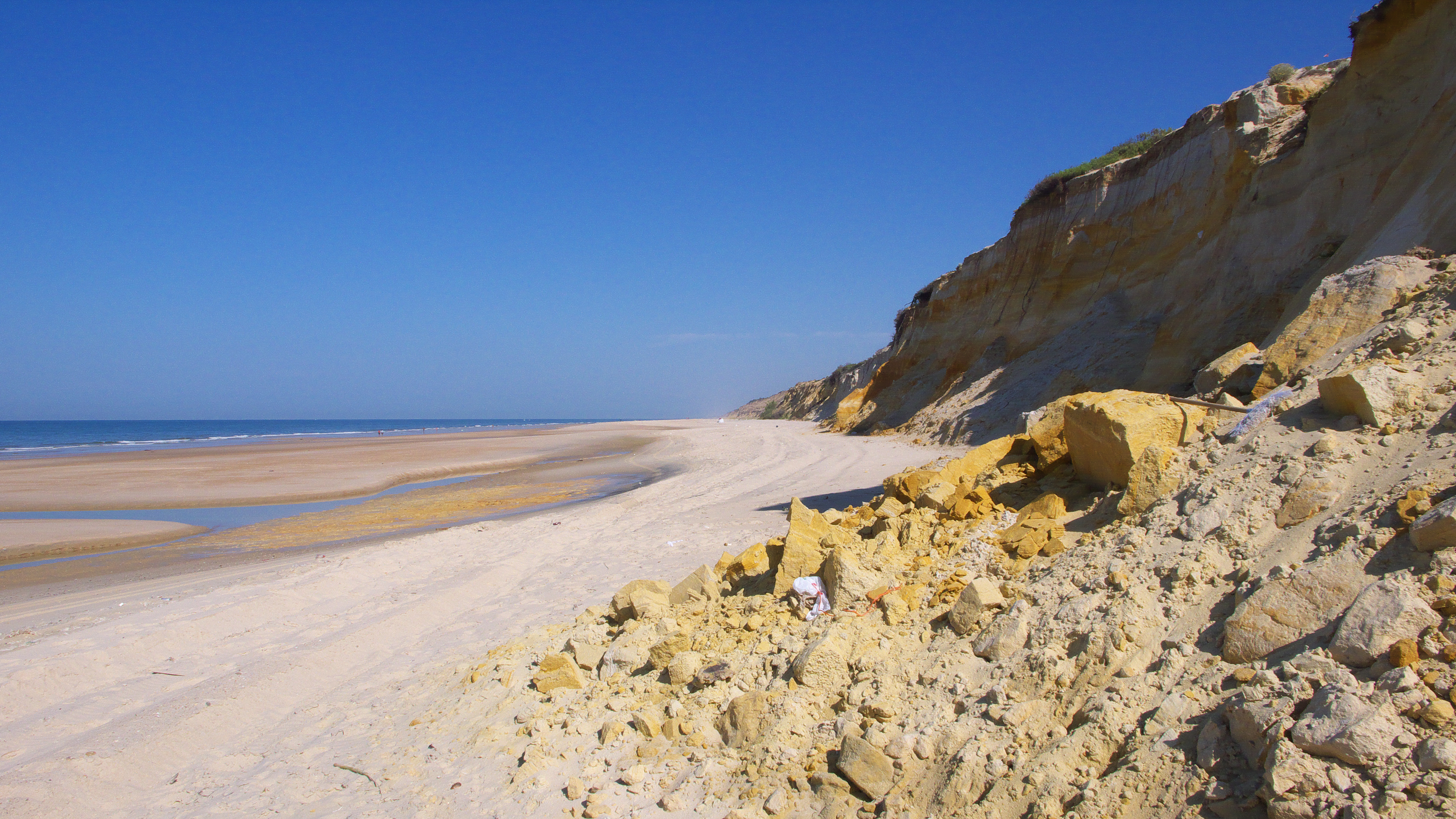 Playa del Asperillo